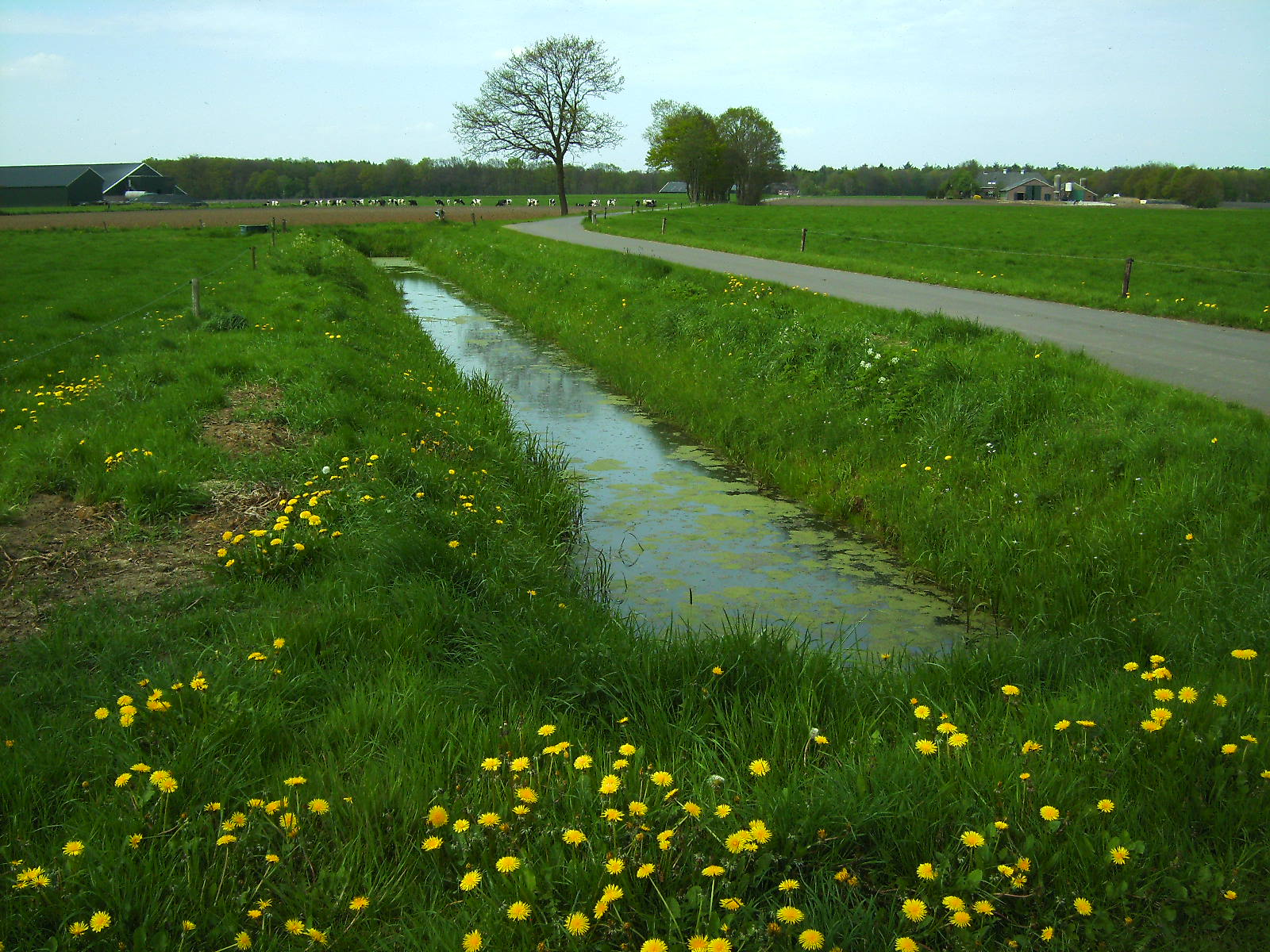 De Averlosche Leide is ruim vijf kilometer lang en dient voornamelijk voor de afwatering van agrarisch gebied. Er zijn vijf stuwtjes die na 2012 zullen worden vervangen door vispasseerbare voorzieningen, tegelijkertijd zal een van beide oevers natuurvriendelijk worden ingericht.